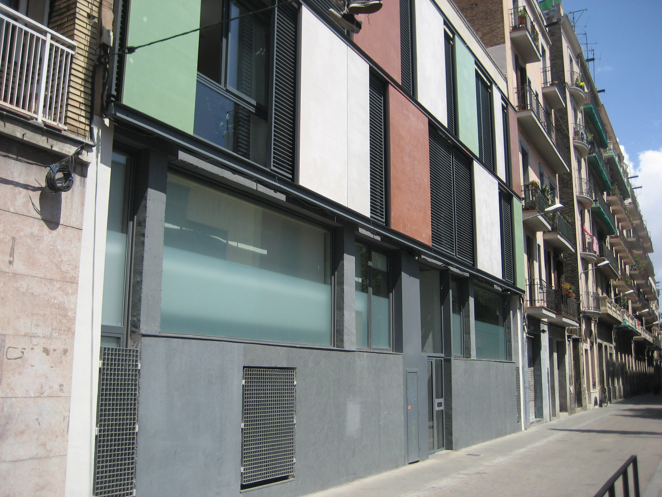 En aquest indret del carrer Perill núm. 9 hi va existir fins l'any 2005 el Teatre Artenbrut. Avui s'hi alça aquest bloc de pisos.